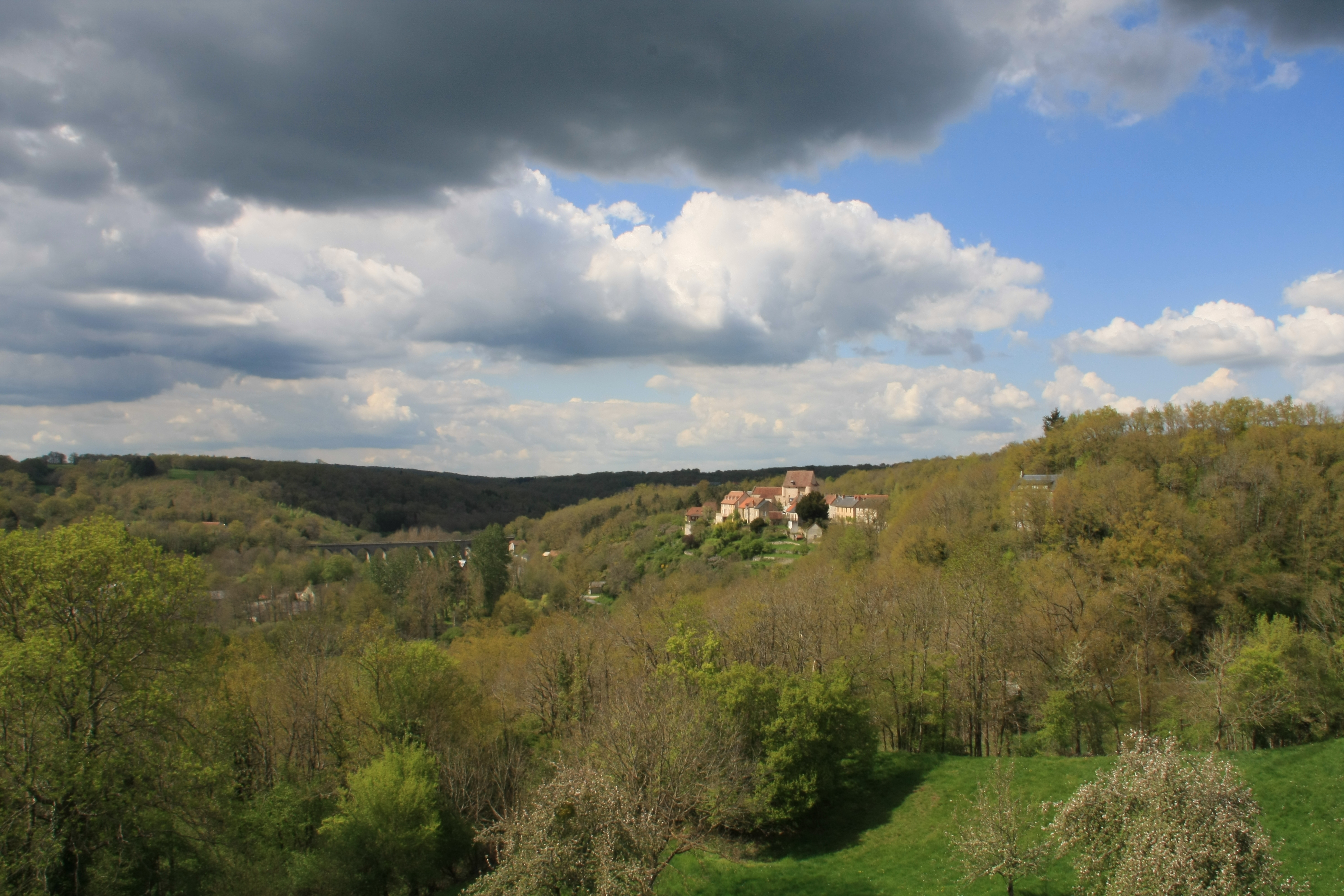 Vue du bourg de Glénic, Creuse